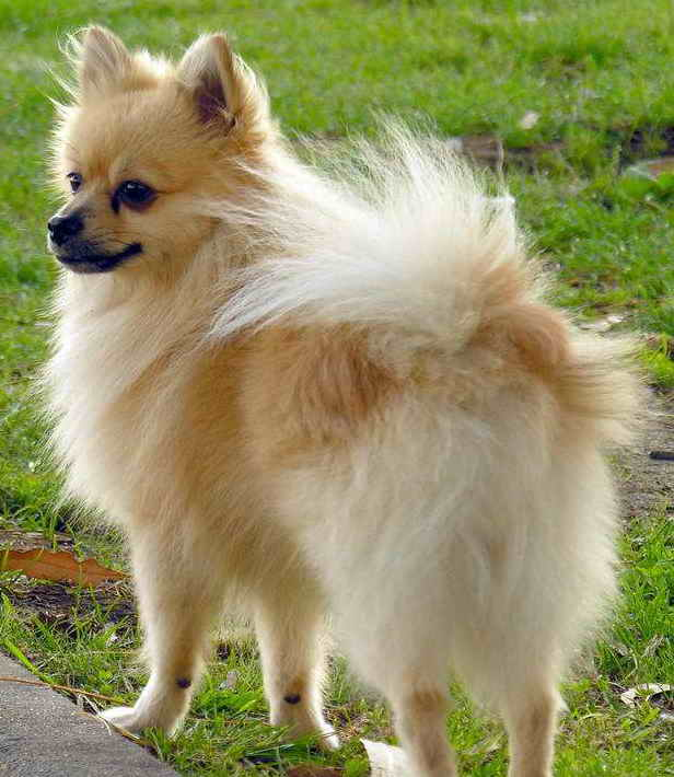 Foto tirada cunha Nikon E8800.